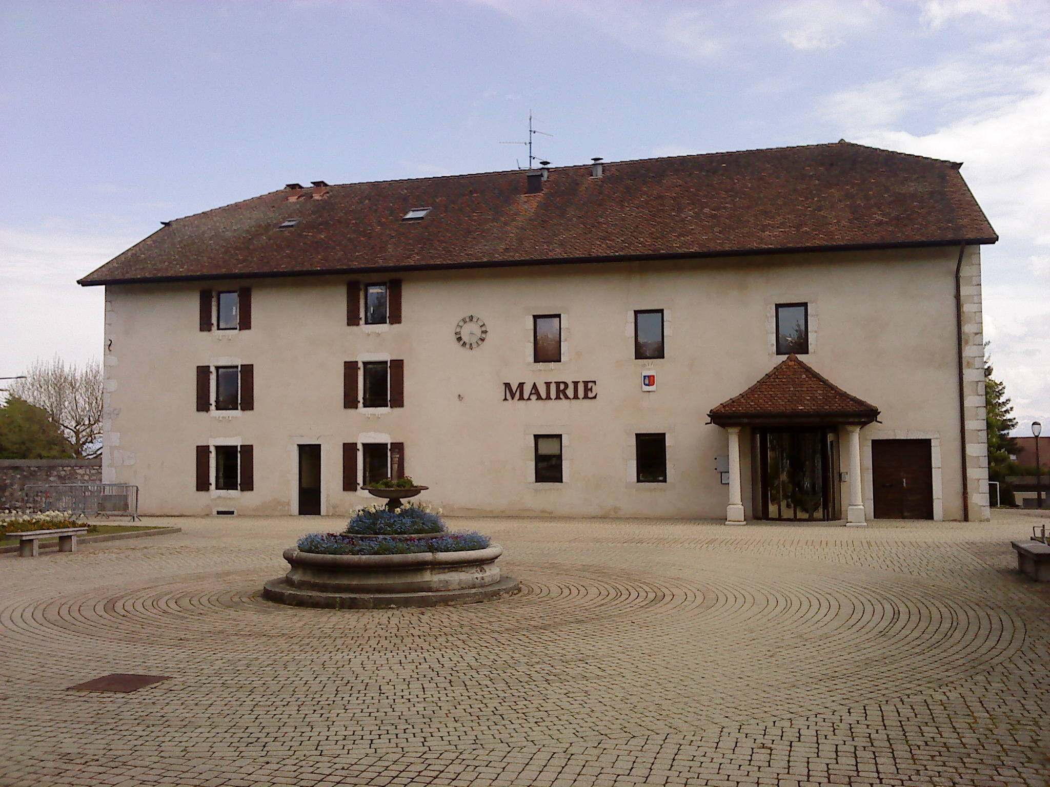 Mairie de Prévessin-Moëns, Ain, France.